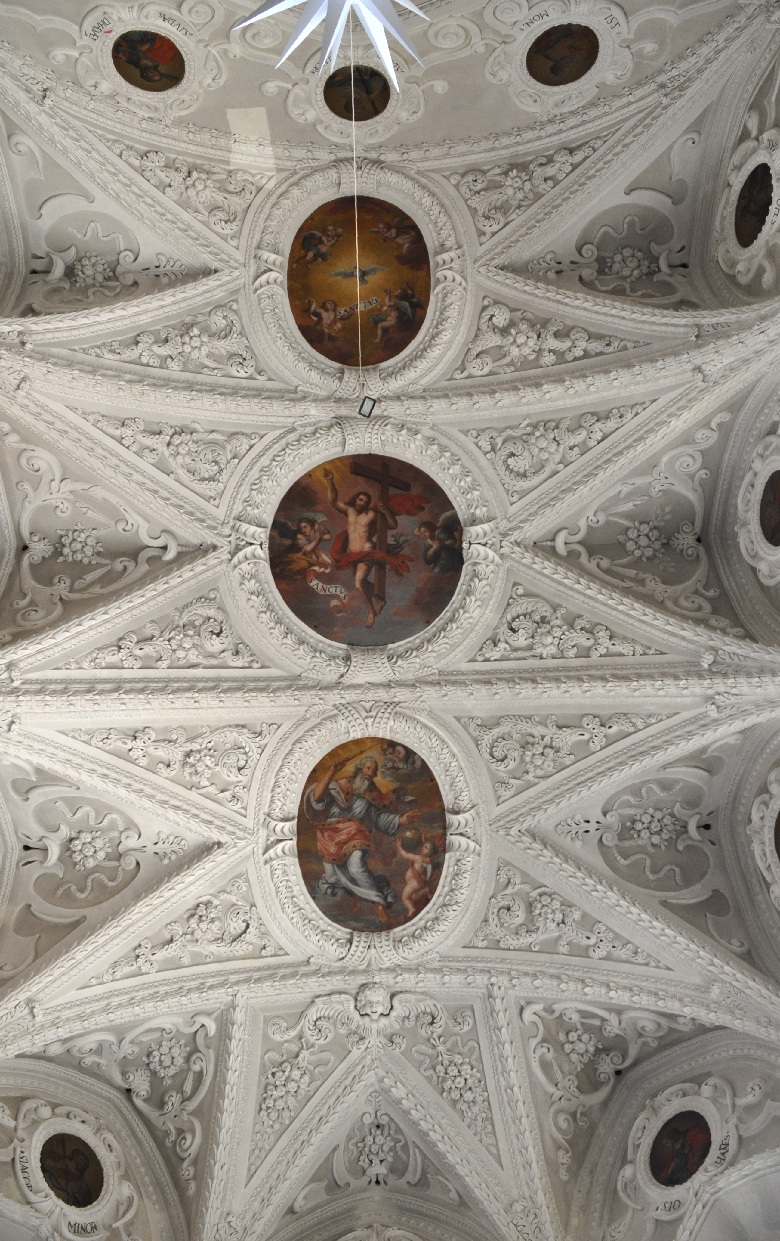 Oettingen in Bayern, evangelisch-lutherische Stadtpfarrkirche Kirche St. Jakob, Chordecke, Deckengemälde vielleicht von Johann Wolfgang Dietrich, Stuck von Mathias Schmutzer (1634–1686), 1680/1681 Johann Wolfgang Dietrich DescriptionGerman painter